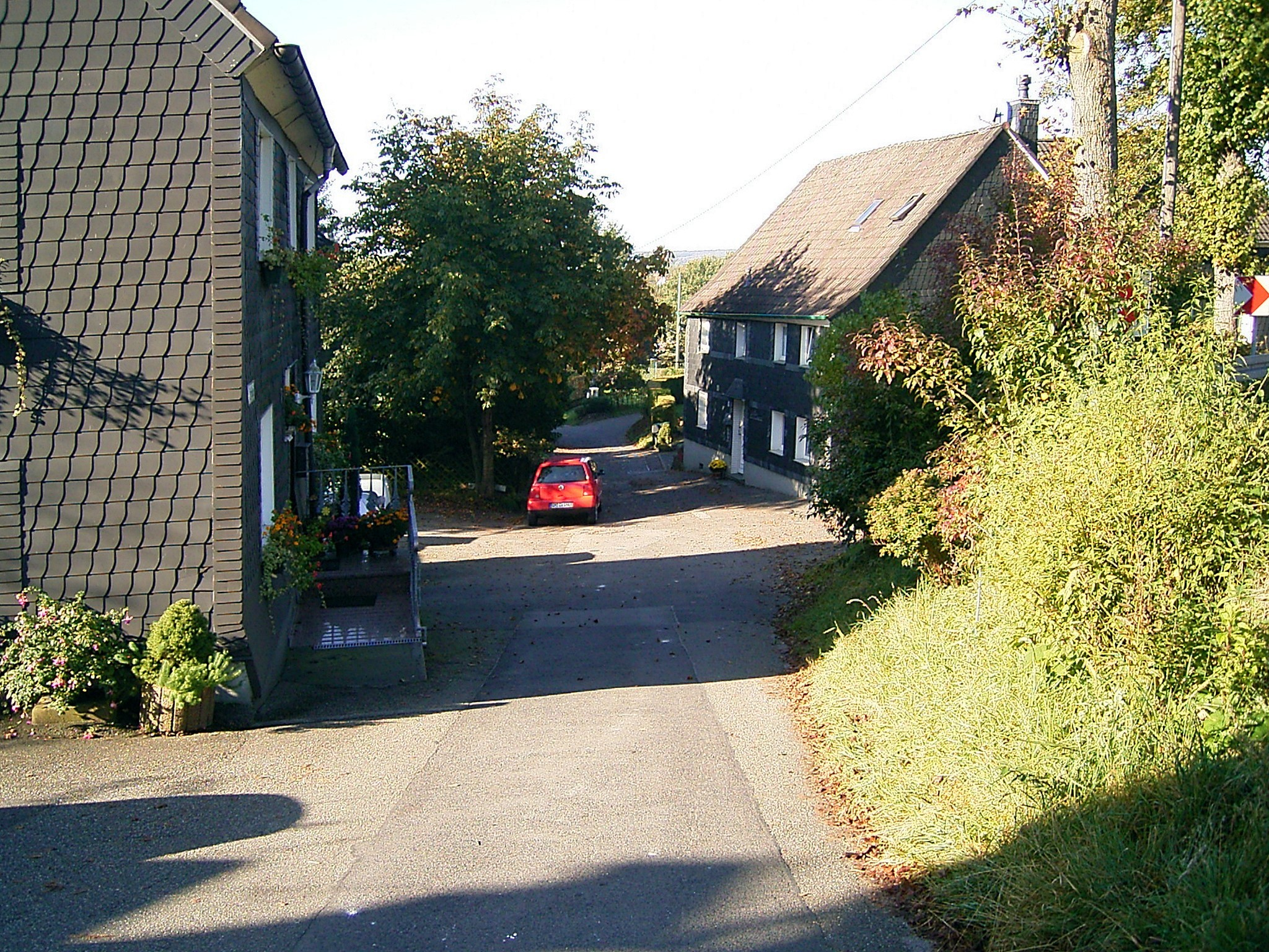 Radevormwald